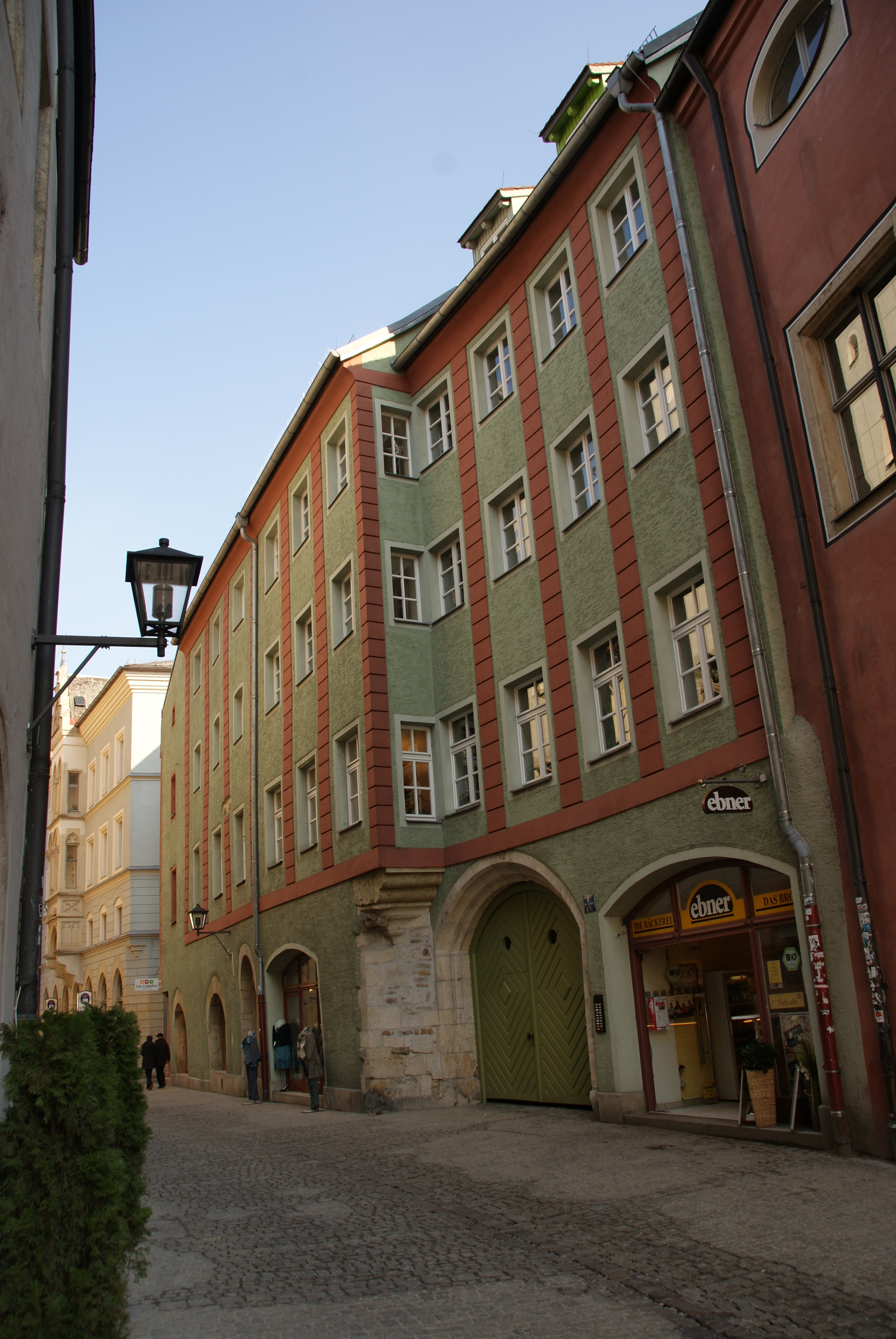 Sog. Gumprecht`sches HausThis is a photograph of an architectural monument.